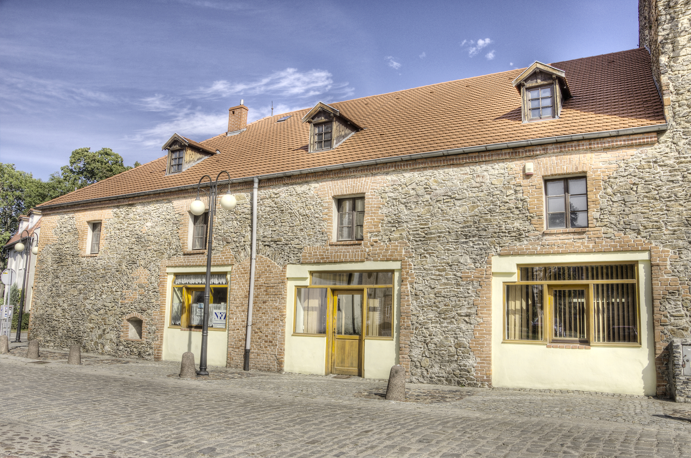 Dzierżoniów, Garncarska 16 - klasztor poaugustiański, obecnie Caritas (zabytek nr 992/Wł z 3.04.1984)